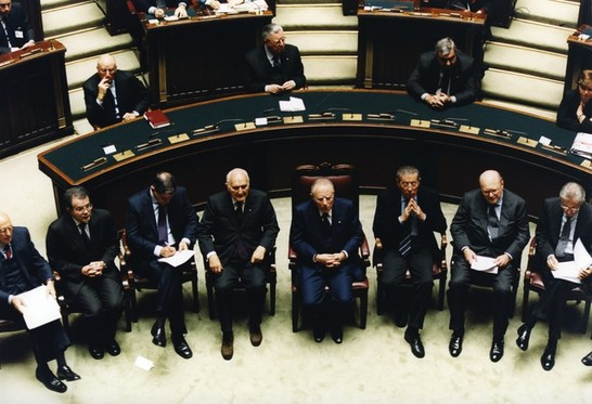 Le massime cariche dello stato assistono alla manifestazione "Per l'avvenire dell'Europa "